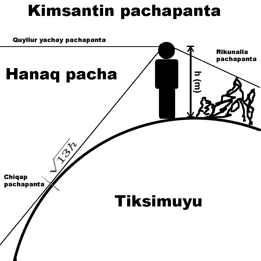 Runa Simi: Kimsantin pachapanta